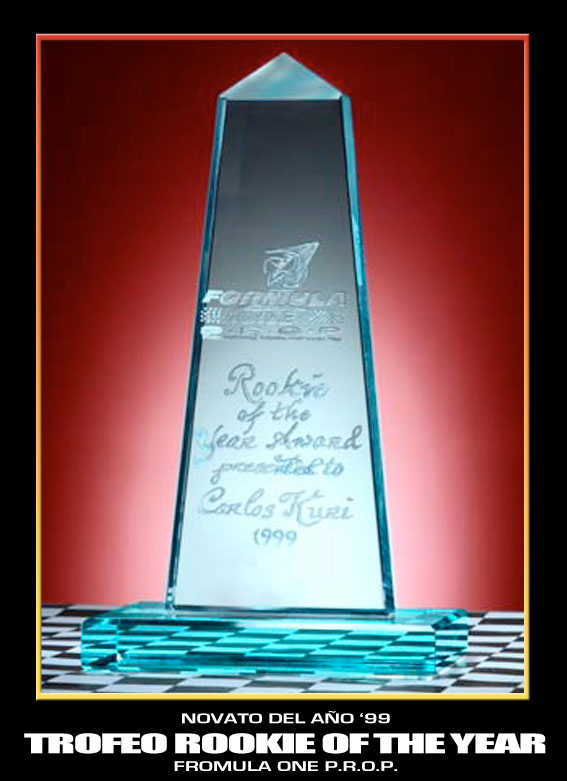 Trofeo "The Rookie of the Year" otorgado a Carlos Kuri en 1999, como piloto revelación de aquel año